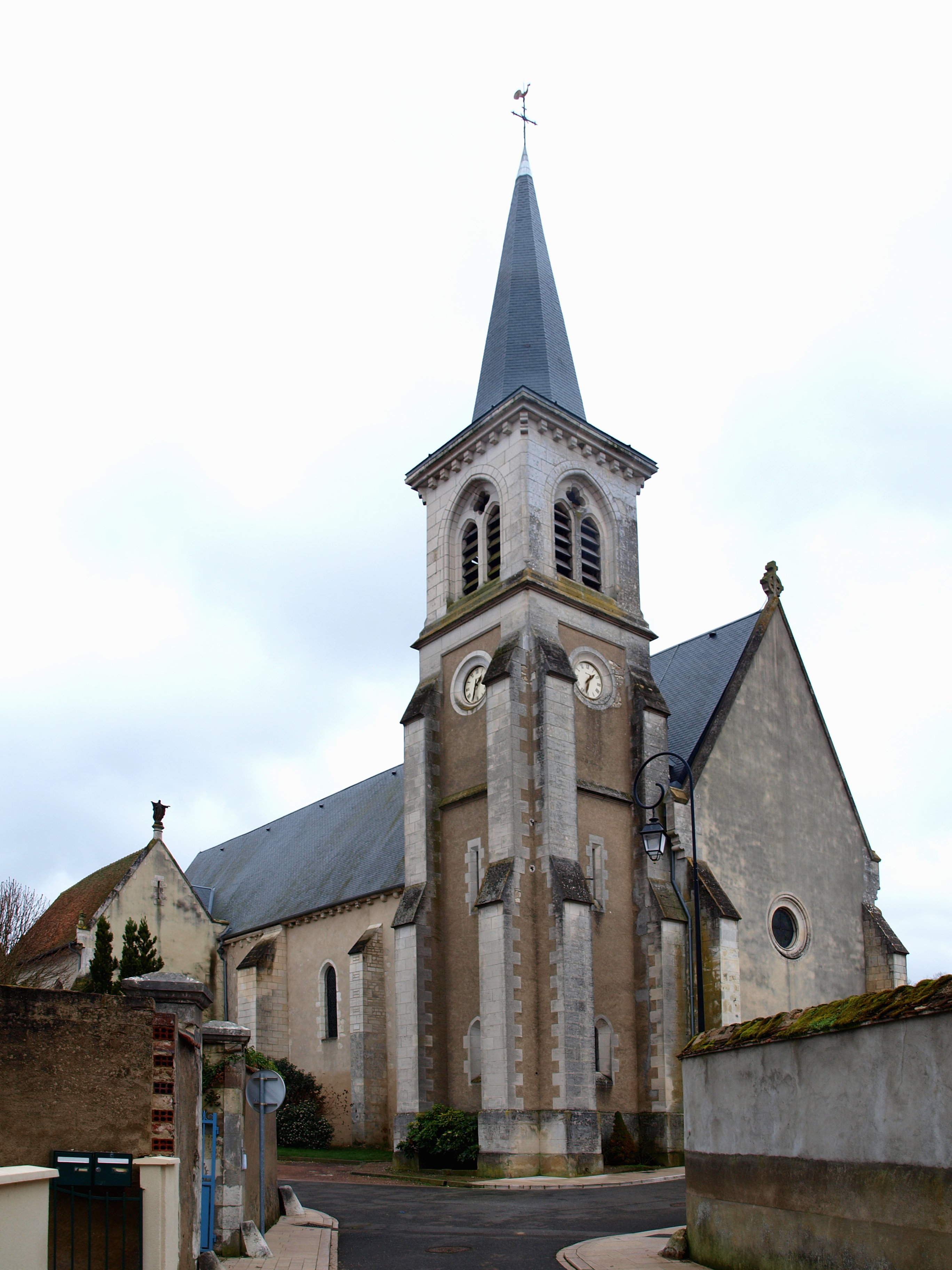 Neuvy-sur-Loire (Nièvre, France) , église